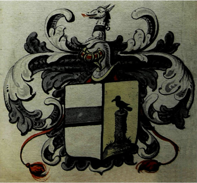 Alliantie wapen van Hendrik Ketel en Amalia Ravensberg